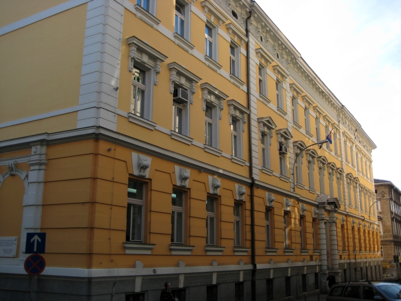 Gimnazija Andrije Mohorovičića, Rijeka